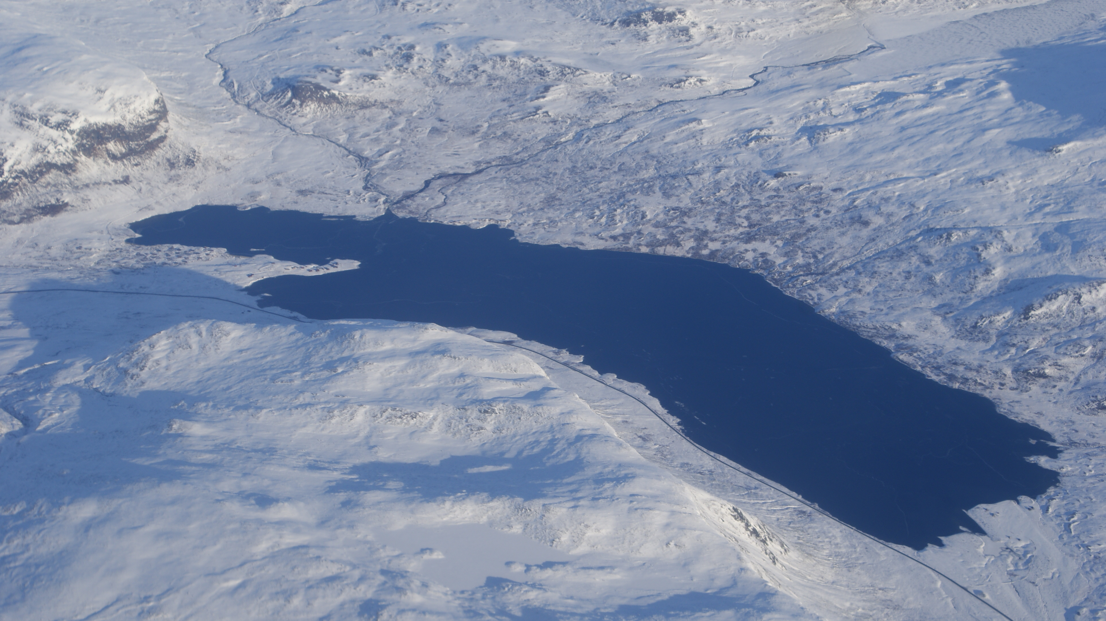 Eldrevatnet, Sogn og Fjordane, Norway. Aerial shot from Bombardier Dash-8 during Widerøe flight Oslo-Førde